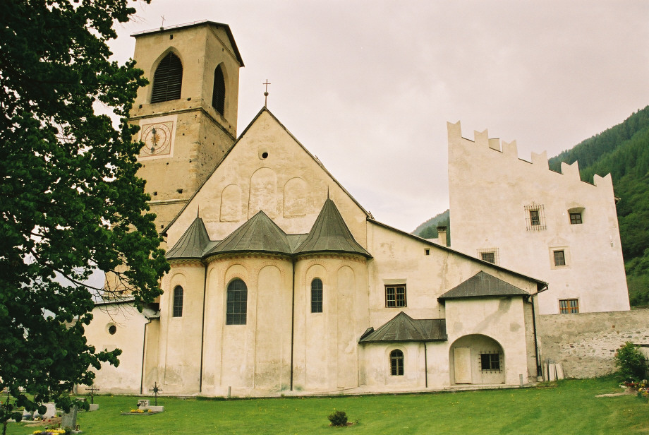 Benediktinerkloster St. Johann, Müstair